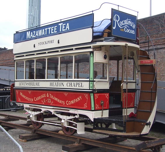 Horse tram